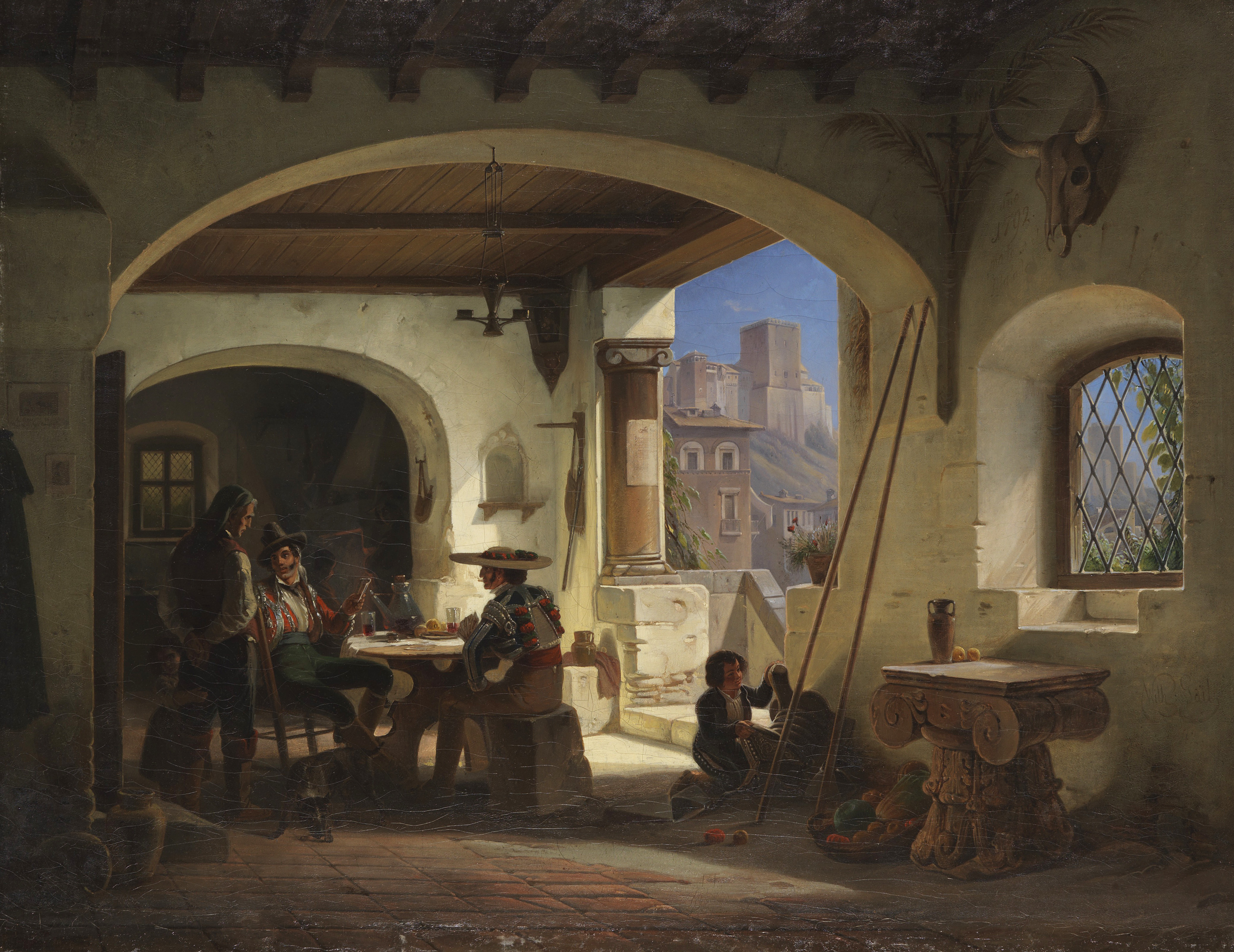 Picadores in einer spanischen Taverne am Fuße der Alhambra. 1842. Öl auf Leinwand. Am rechten Bildrand signiert und datiert. 81,5 x 104,5 cm